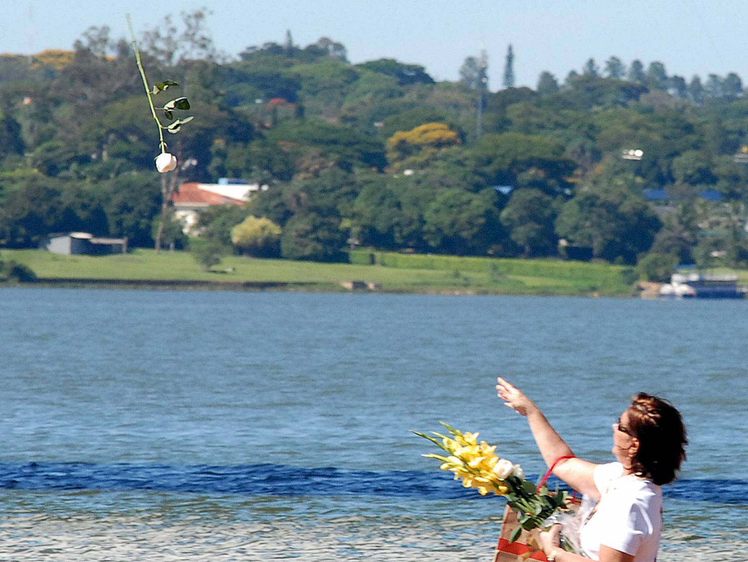 Oferenda no Lago Paranoá